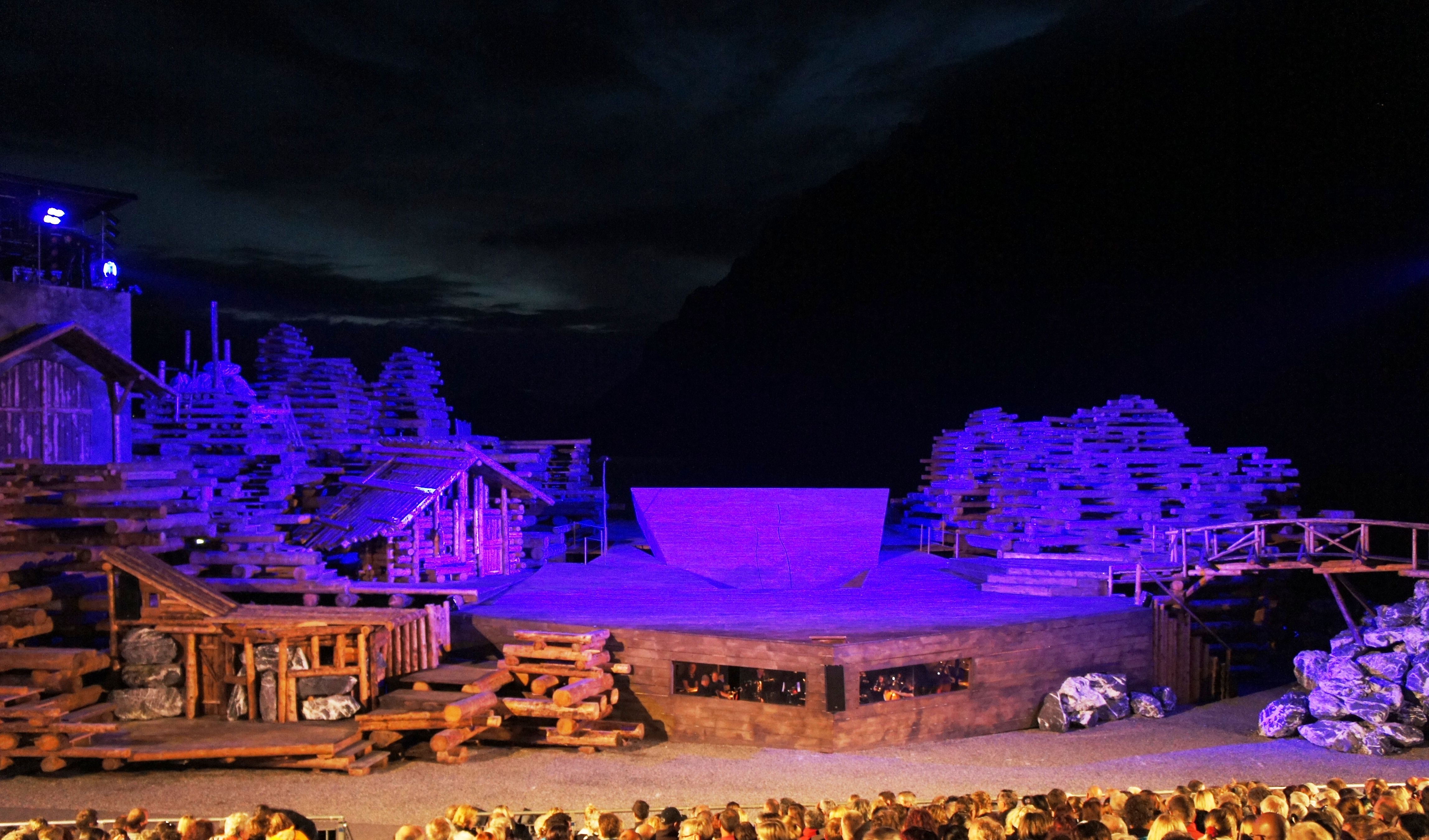 Die Walensee-Bühne (mittlerer Teil - bewegter Teil des Bühnenbodens) für Tell - Das Musical am Ende der Pause.